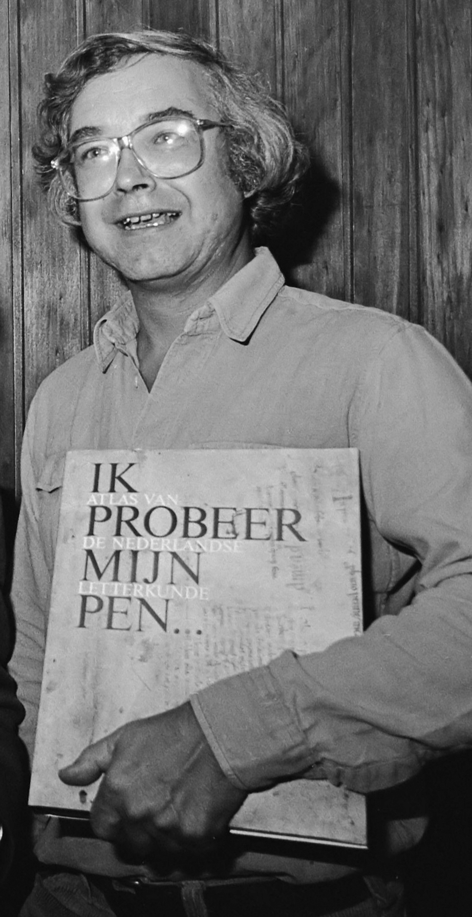 Kees Nieuwenhuijzen met het boek van de maand Ik probeer mijn pen *29 november 1979